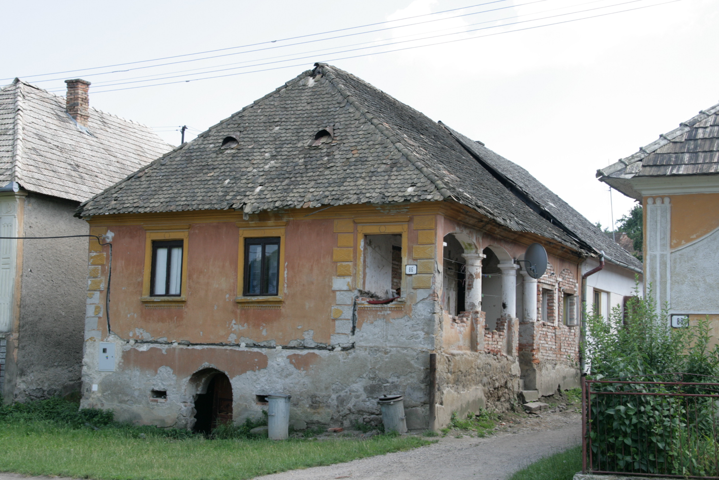 Perjése - régi ház a községben